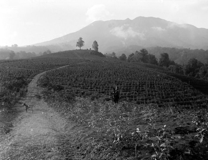 Negatief. Thee-tuin, Preanger